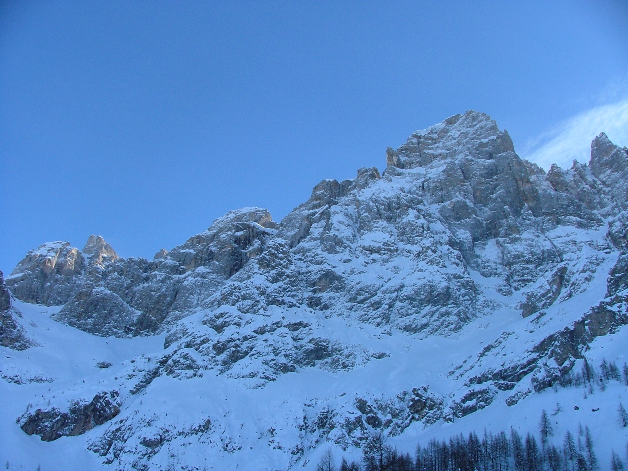 Questa foto l'ho scattata io personalmente il 4 gennaio 2004 dalla val Venegia(TN) e mostra il versante ovest della Cima dei Bureloni